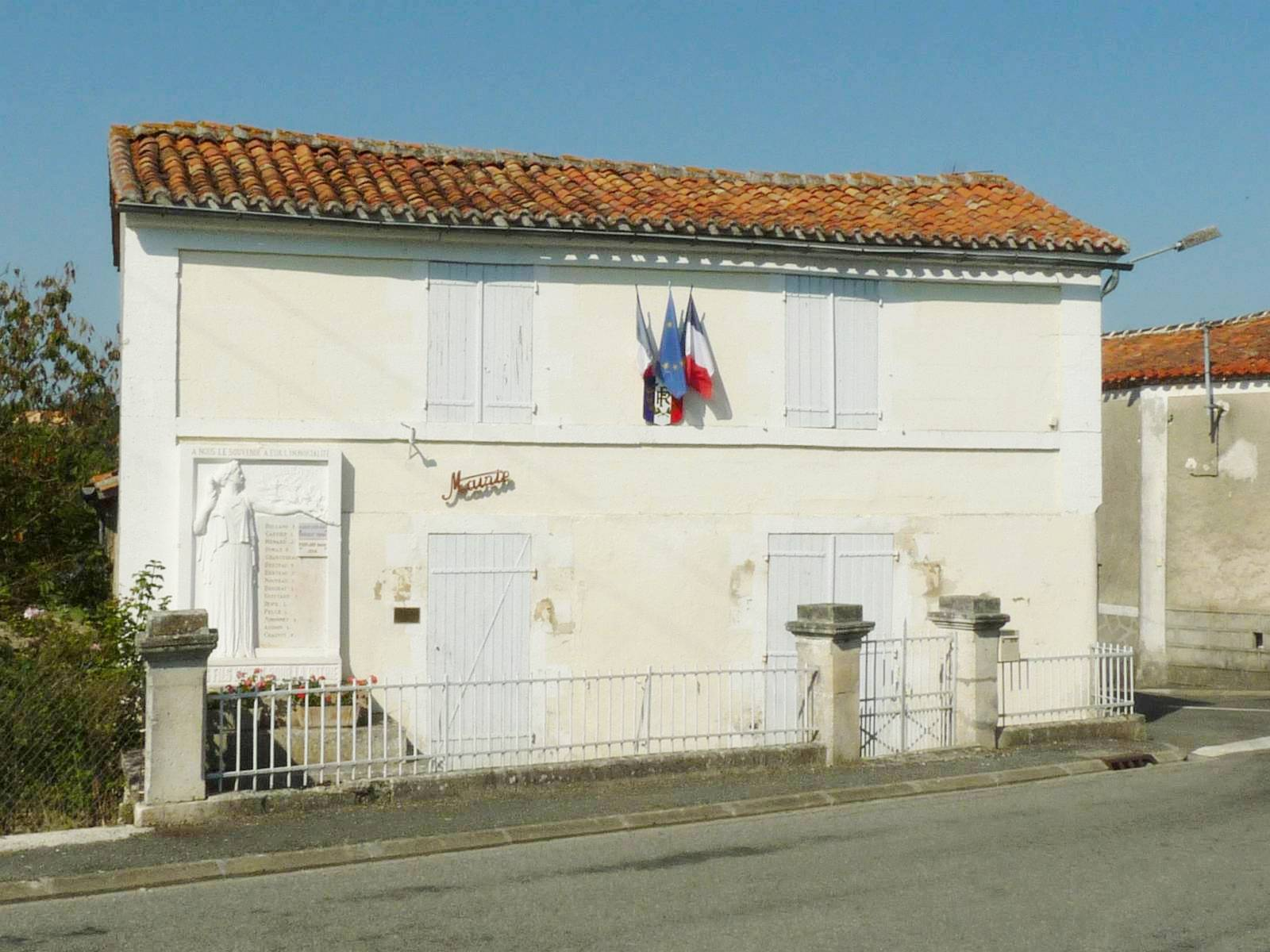 mairie de Juillaguet (16), France